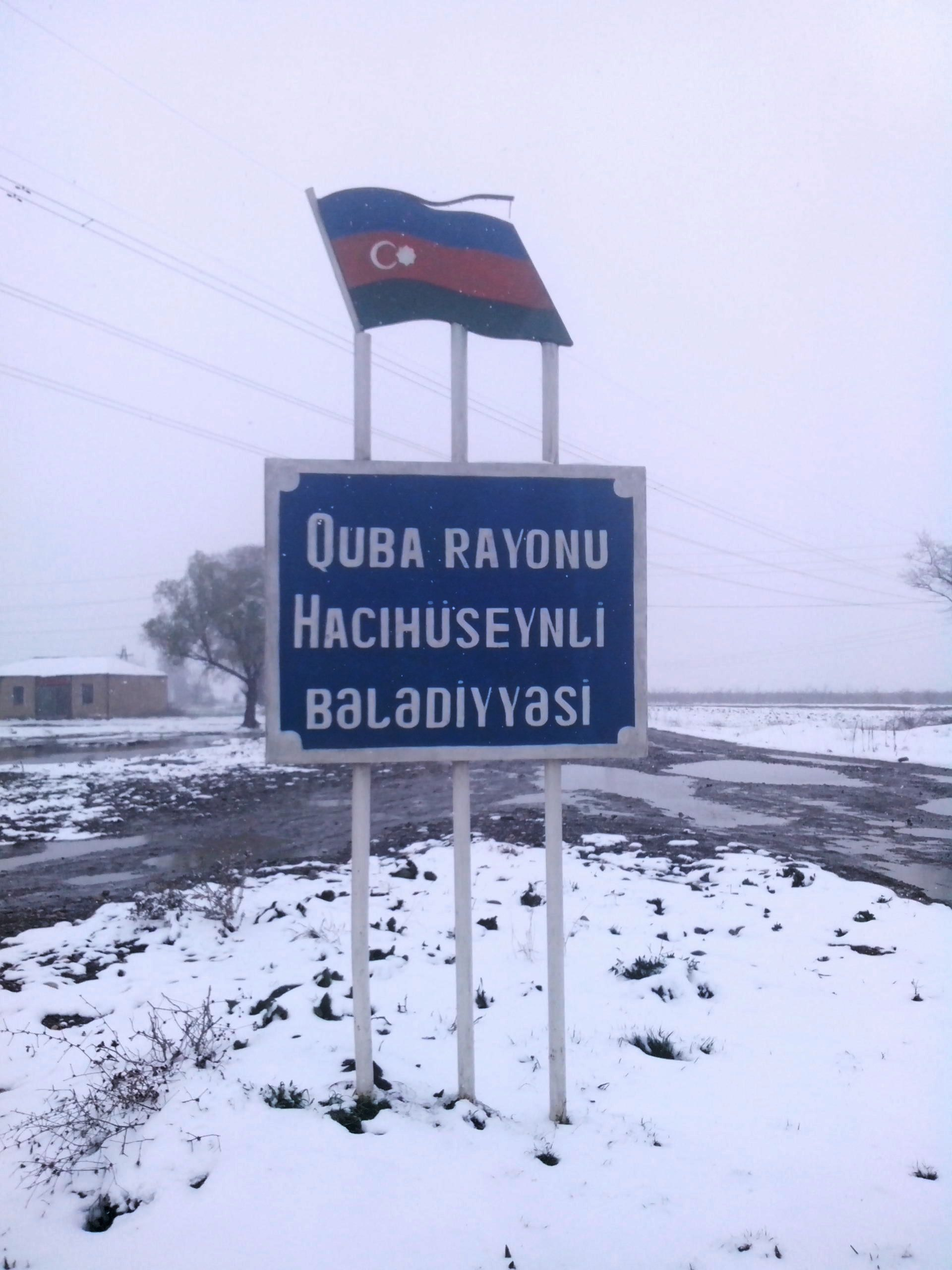 Quba rayonu Hacıhüseynli bələdiyyəsi